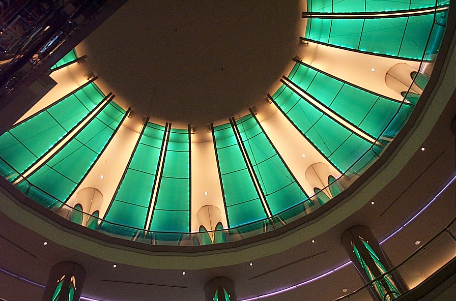 Akmerkez